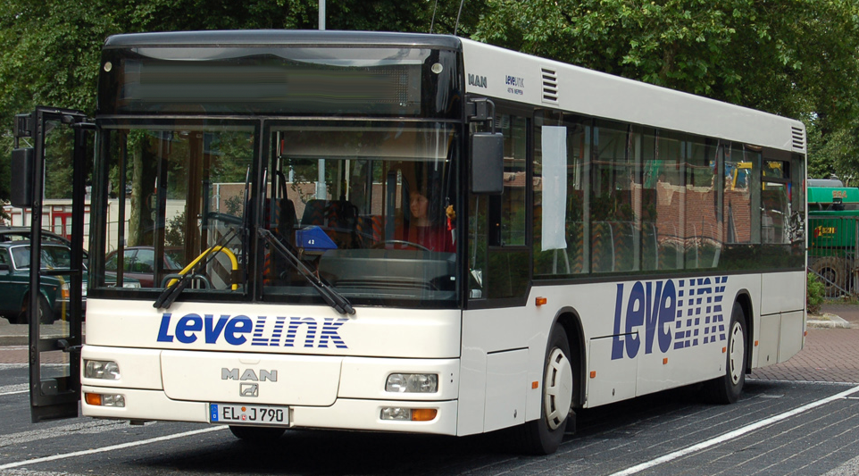 MAN Bus van het Duitse Levelink